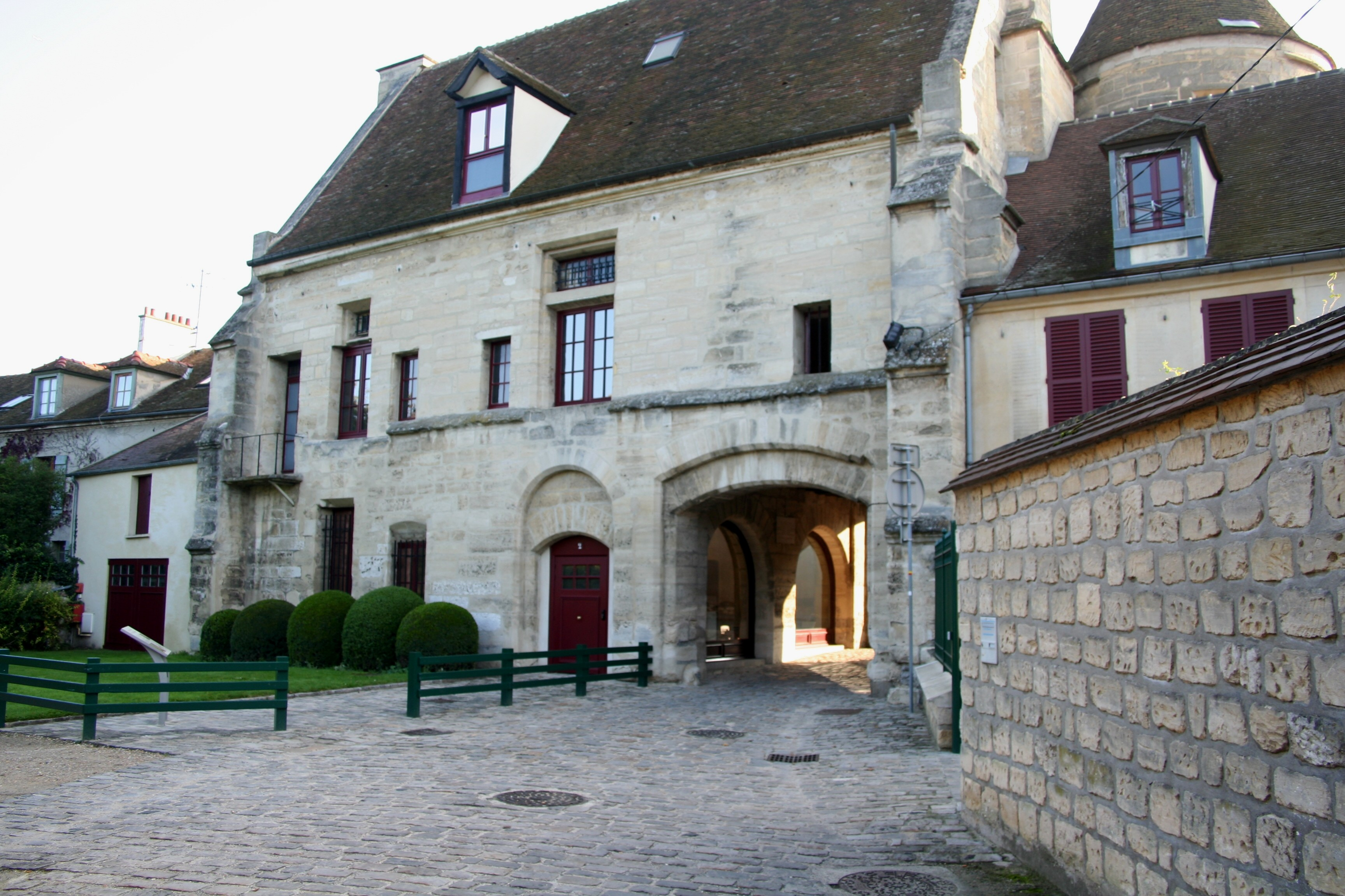 Porterie (vue intérieure) à Poissy - Yvelines (France)